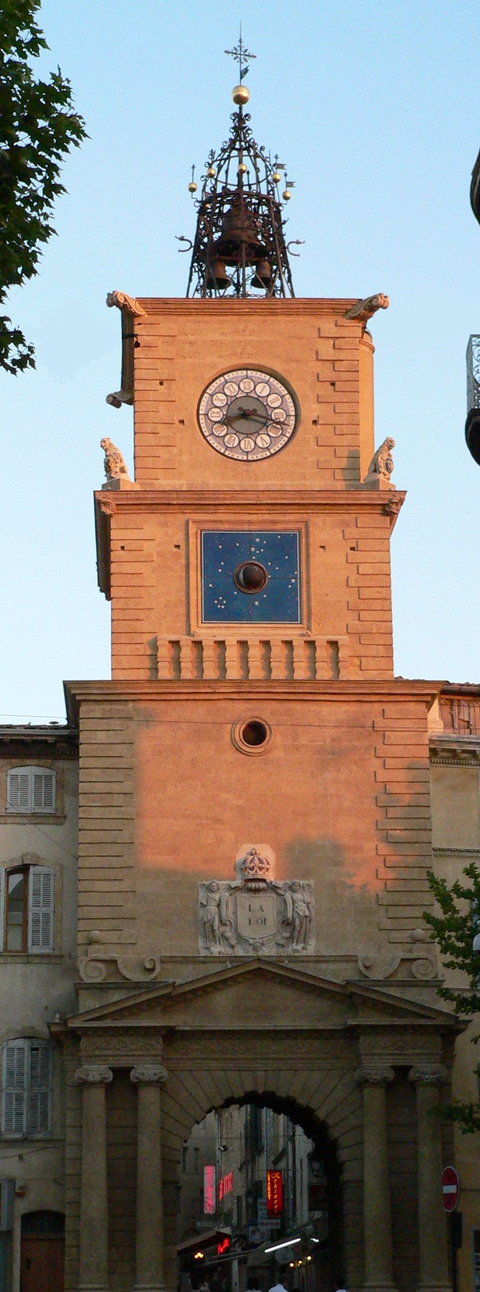 La Tour de l'Horloge à Salon-de-Provence (Bouches-du-Rhône, France)